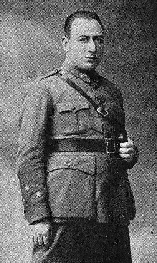 Antonio Carreró Vergés, fotografía en Vida Gallega 1936